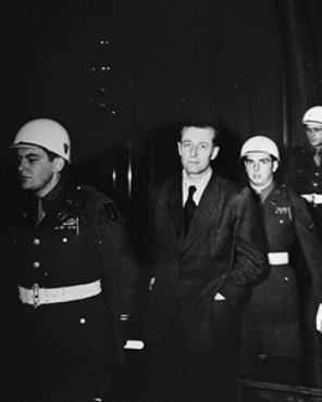 Der Angeklagte Hans Fritzsche, ehemals Leiter der Abteilung Rundfunk im Reichspropagandaministerium wird von amerikanischen Militärpolizisten in den Gerichtsaal der Nürnberger Kriegsverbrecherprozesse geführt.